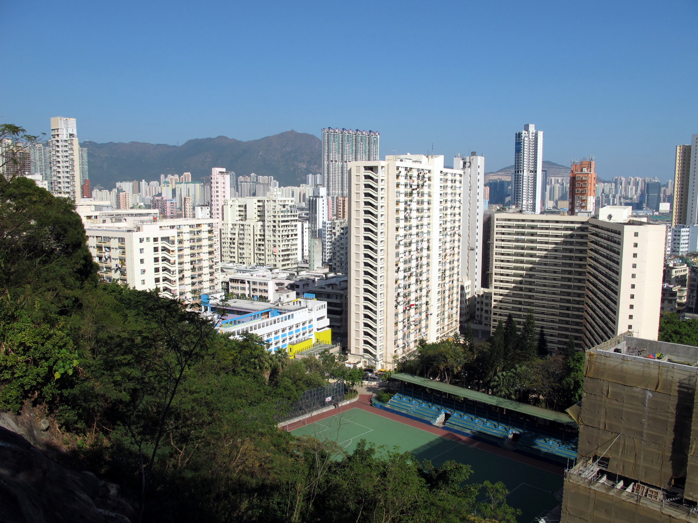 Lok Man Sun Chuen